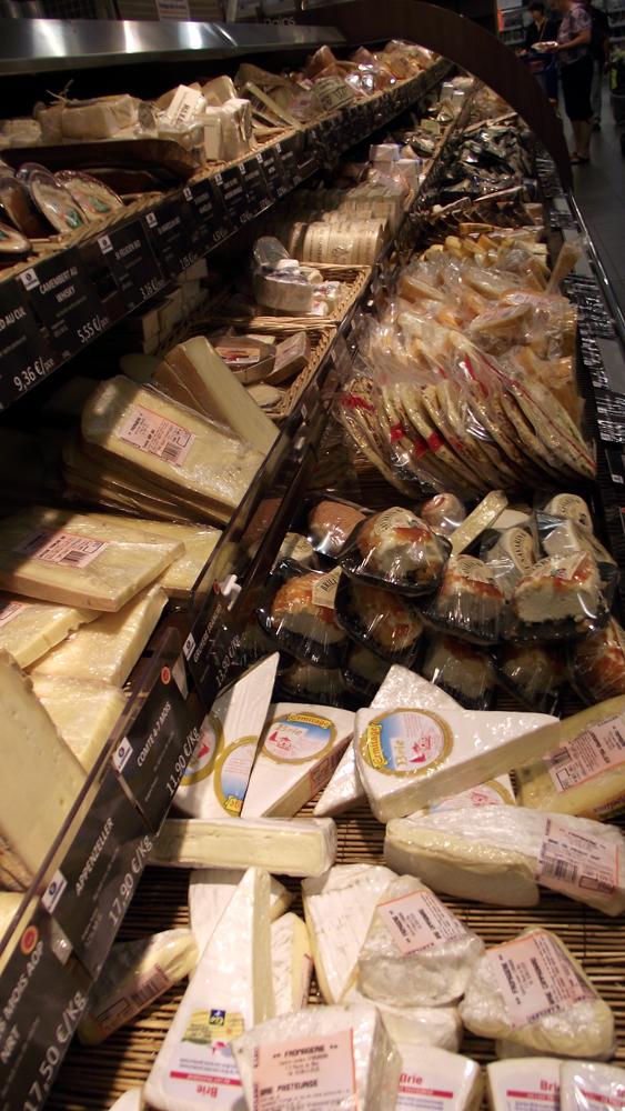 étalage de fromages en France